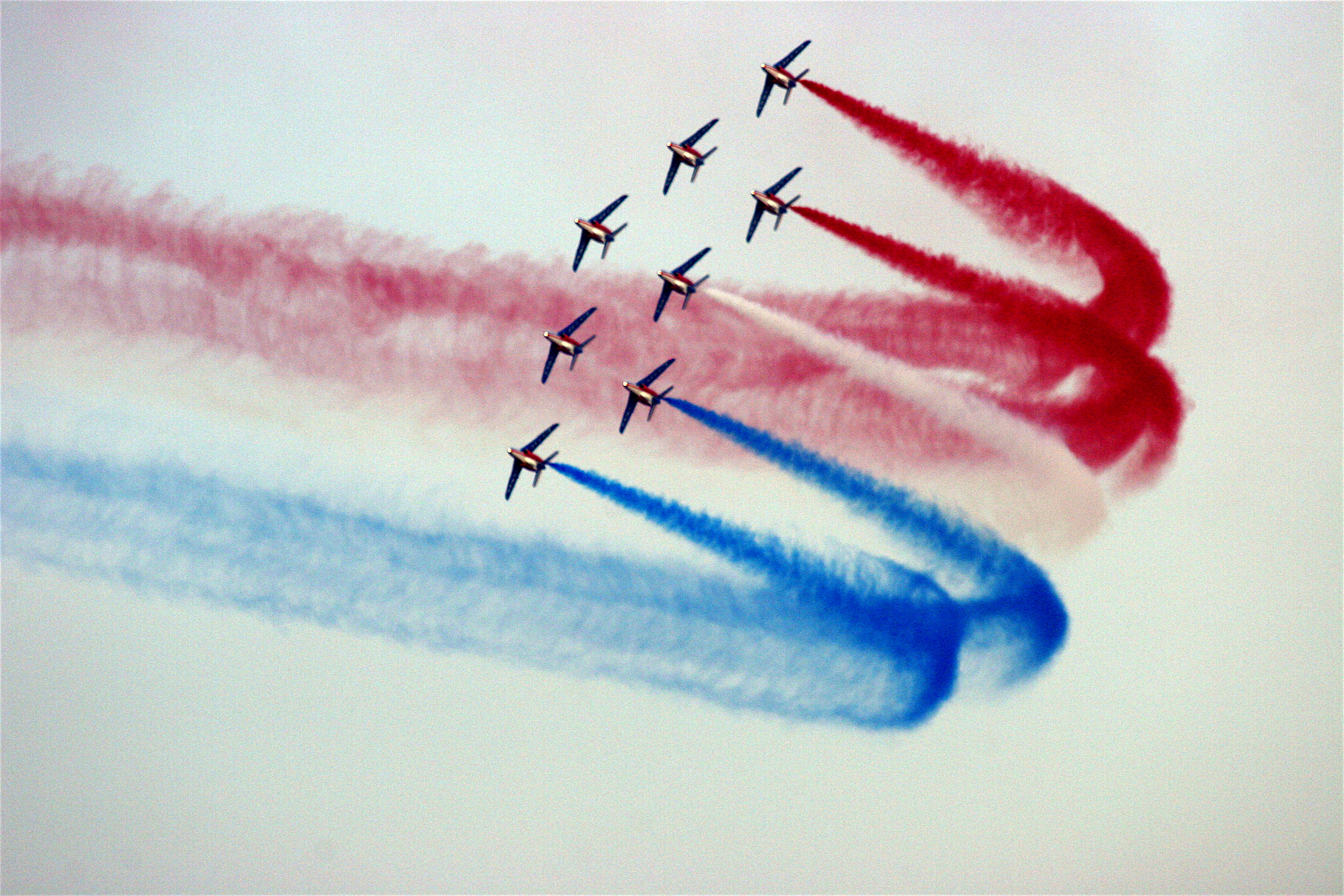 Patrouille de France : virage tricolore à 8